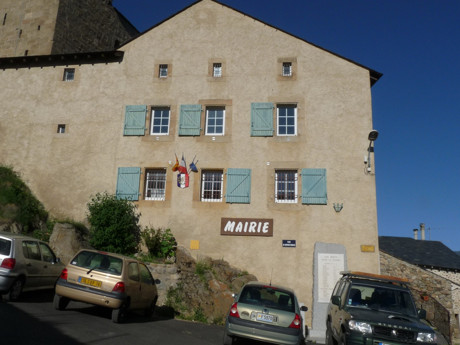 Mairie de Sauto, Pyrénées-Orientales, France